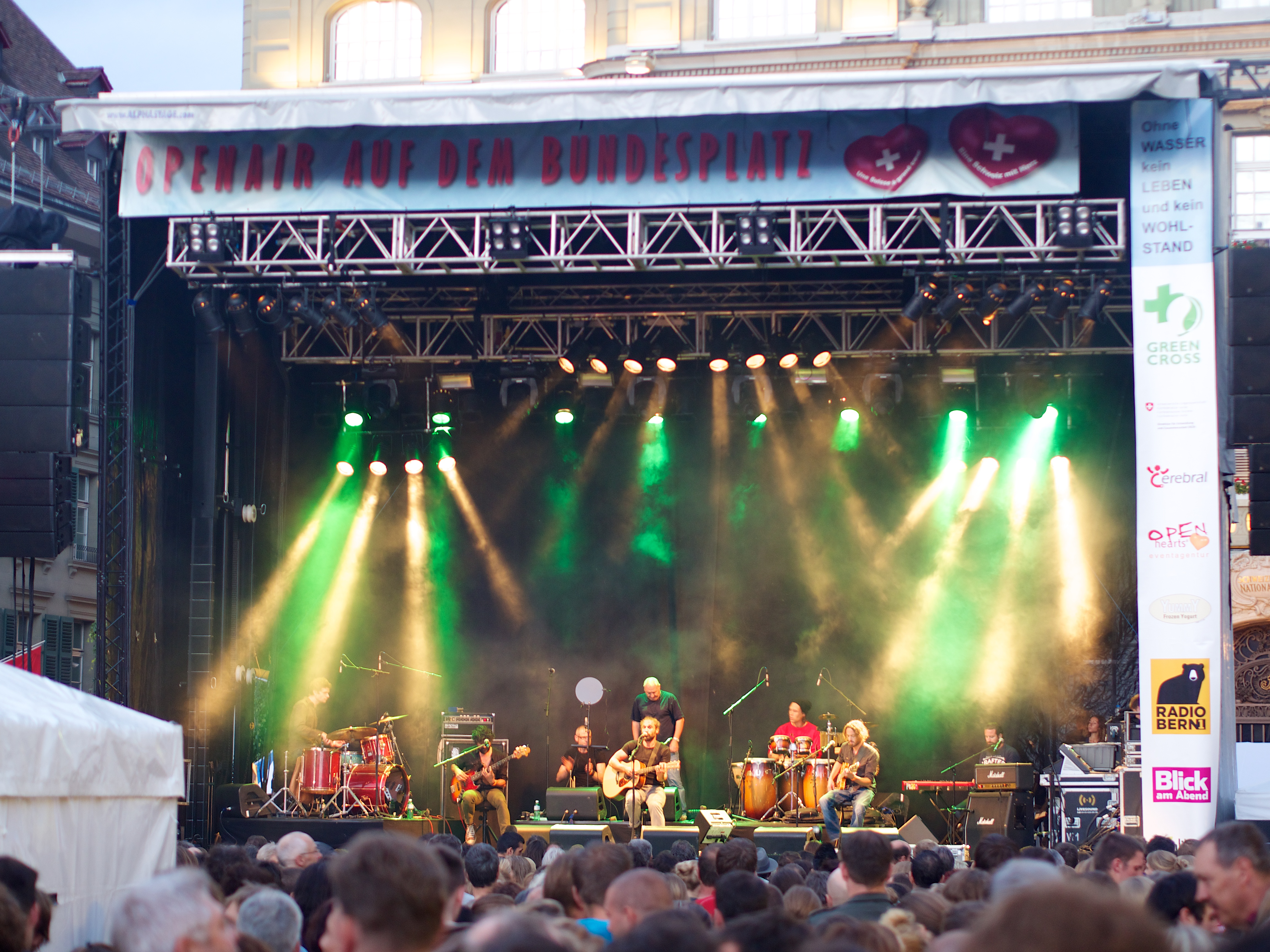 Der barbadisch-schweizerischer Musiker William White mit seiner Band am Openair auf dem Bundesplatz 2013